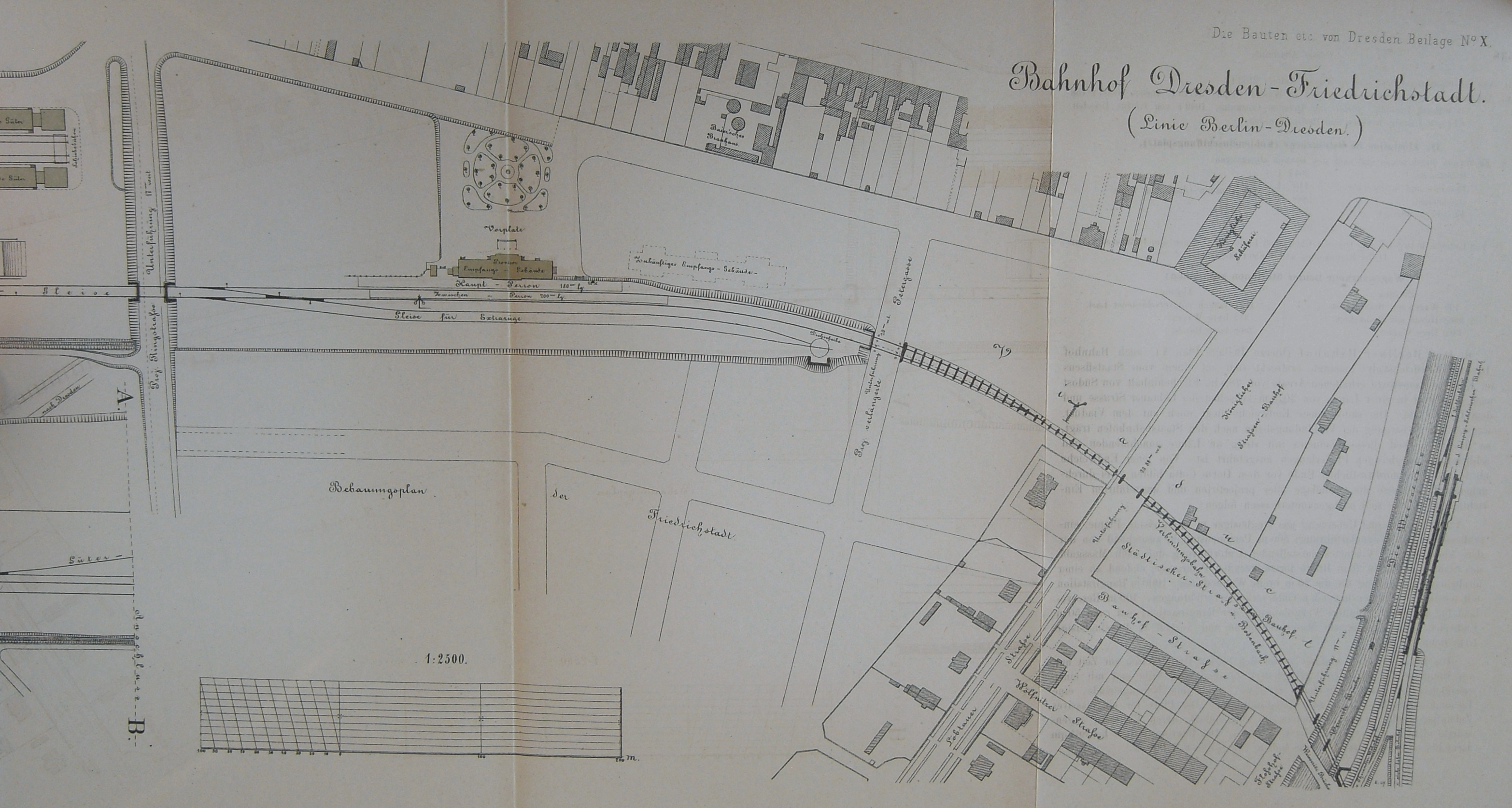 Lageplan des Friedrichstädter Bahnhofs, Teil Personenbahnhof